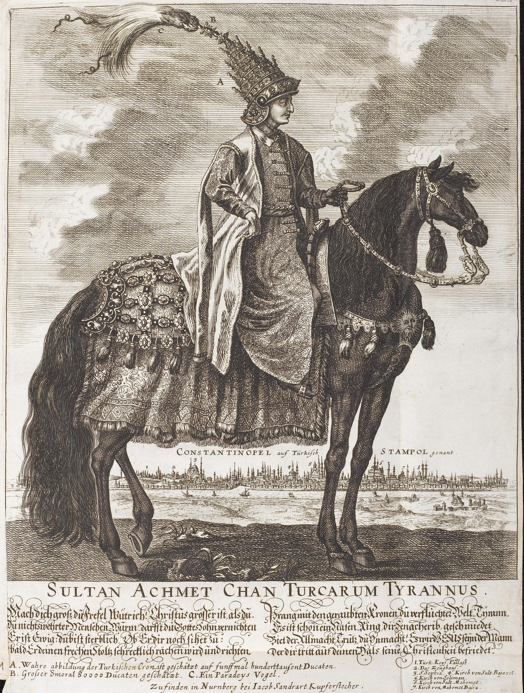 Grafik aus dem Klebeband Nr. 2 der Fürstlich Waldeckschen Hofbibliothek Arolsen Motiv: "Sultan Achmet Chan Turcarum Tyrannus" (gemeint ist Mehmed IV.) im Hintergrund Konstantinopel mit Gedicht von Sigmund von Birken